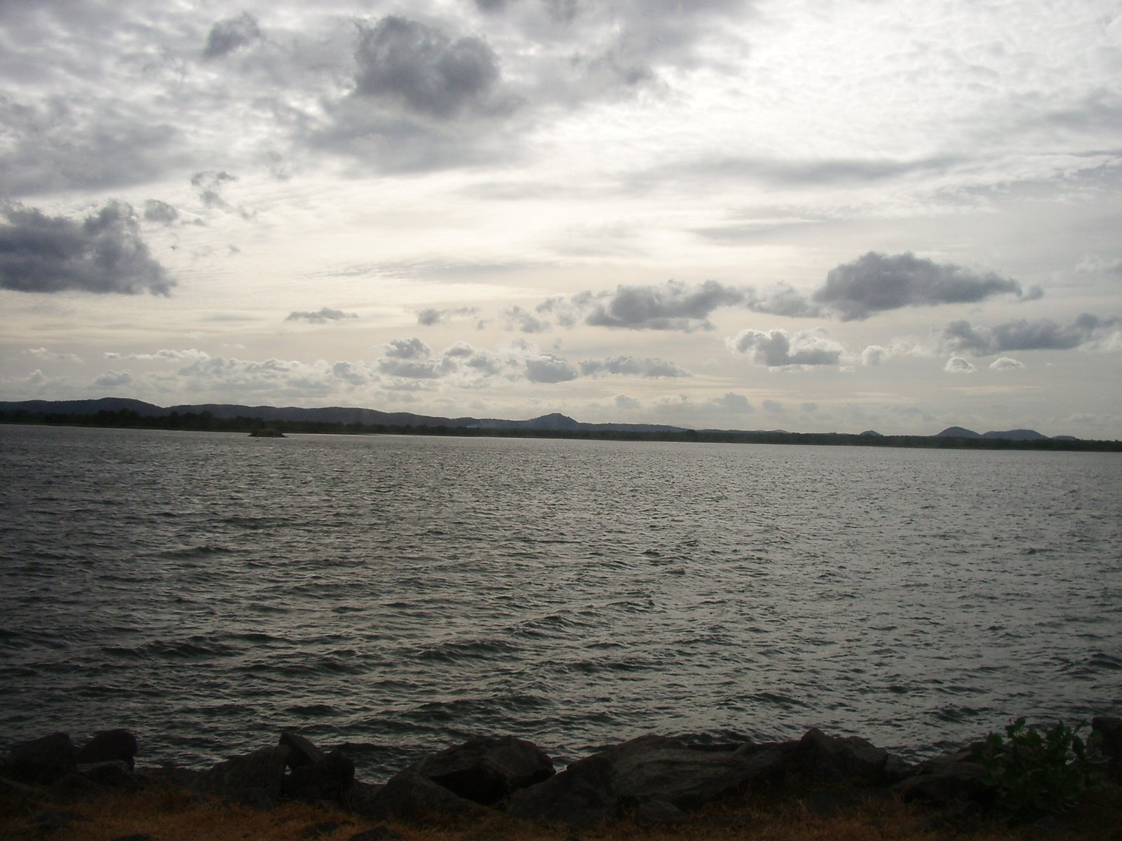 Antic pantà construit per un rei de Polonnaruwa prop de la seva capital i que encara existeix; foto feta per J. Ollé el juliol del 2006 -Parakrama Samudra reservoir